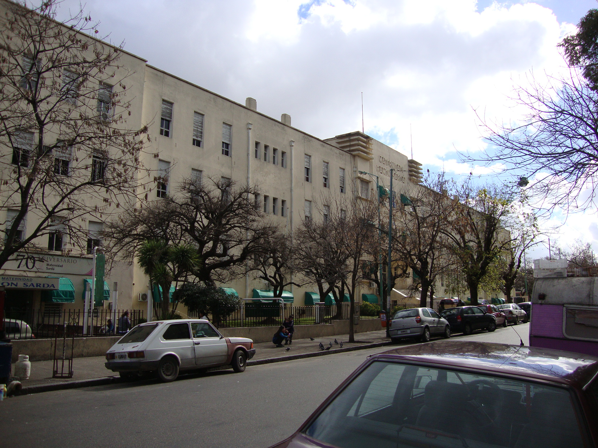 Fachada de la Maternidad "Ramón Sardá", en la calle Esteban de Luca 2151. Construida en 1934. Buenos Aires, Argentina.